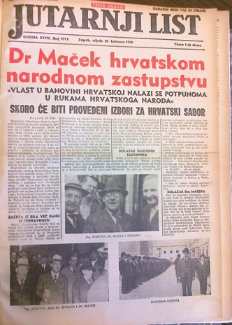 Naslovnica Jutarnjeg lista od 30. kolovoza 1939. godine prati uspostavu Banovine Hrvatske